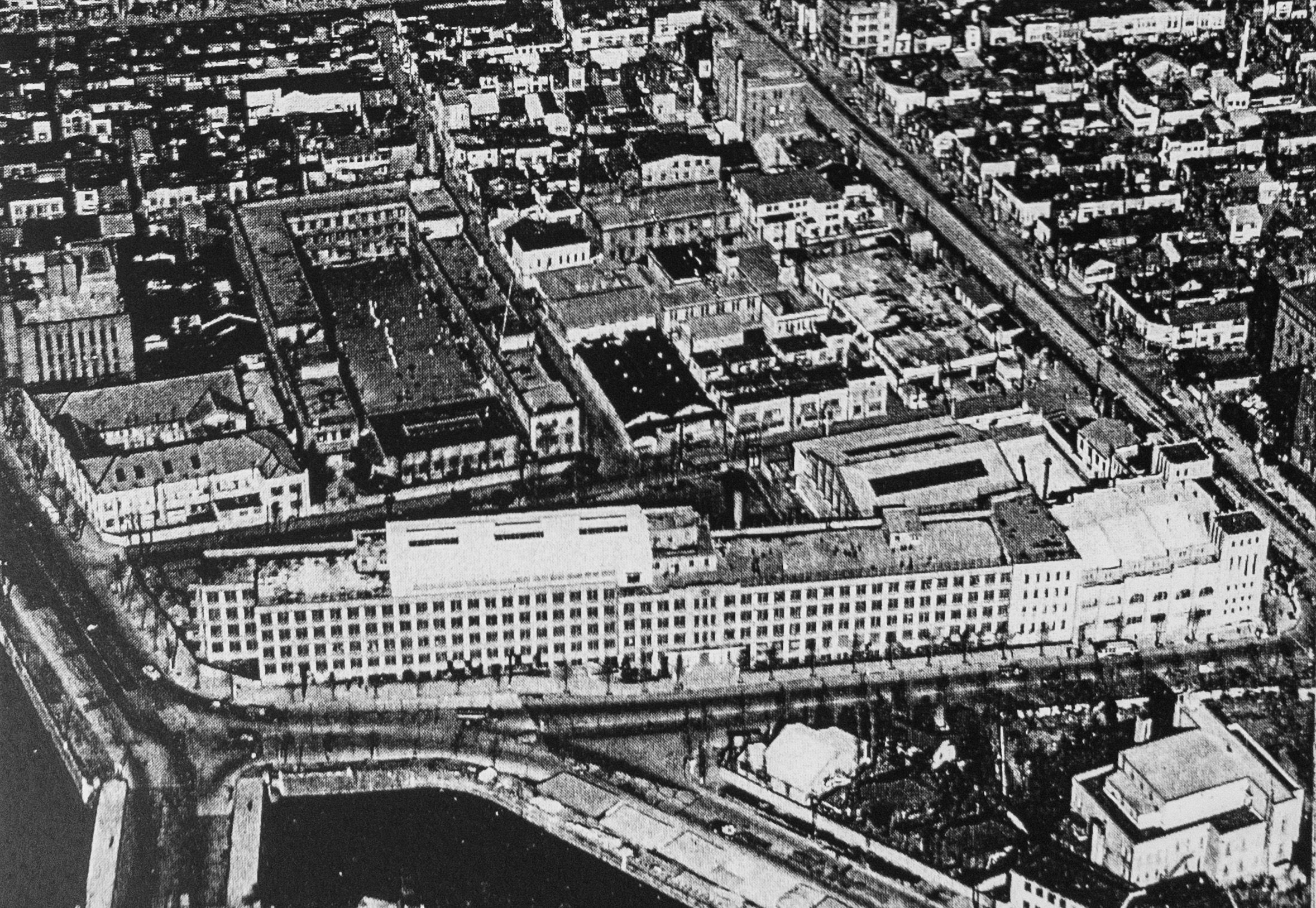 共立女子大学一橋キャンパス、昭和11年落成。